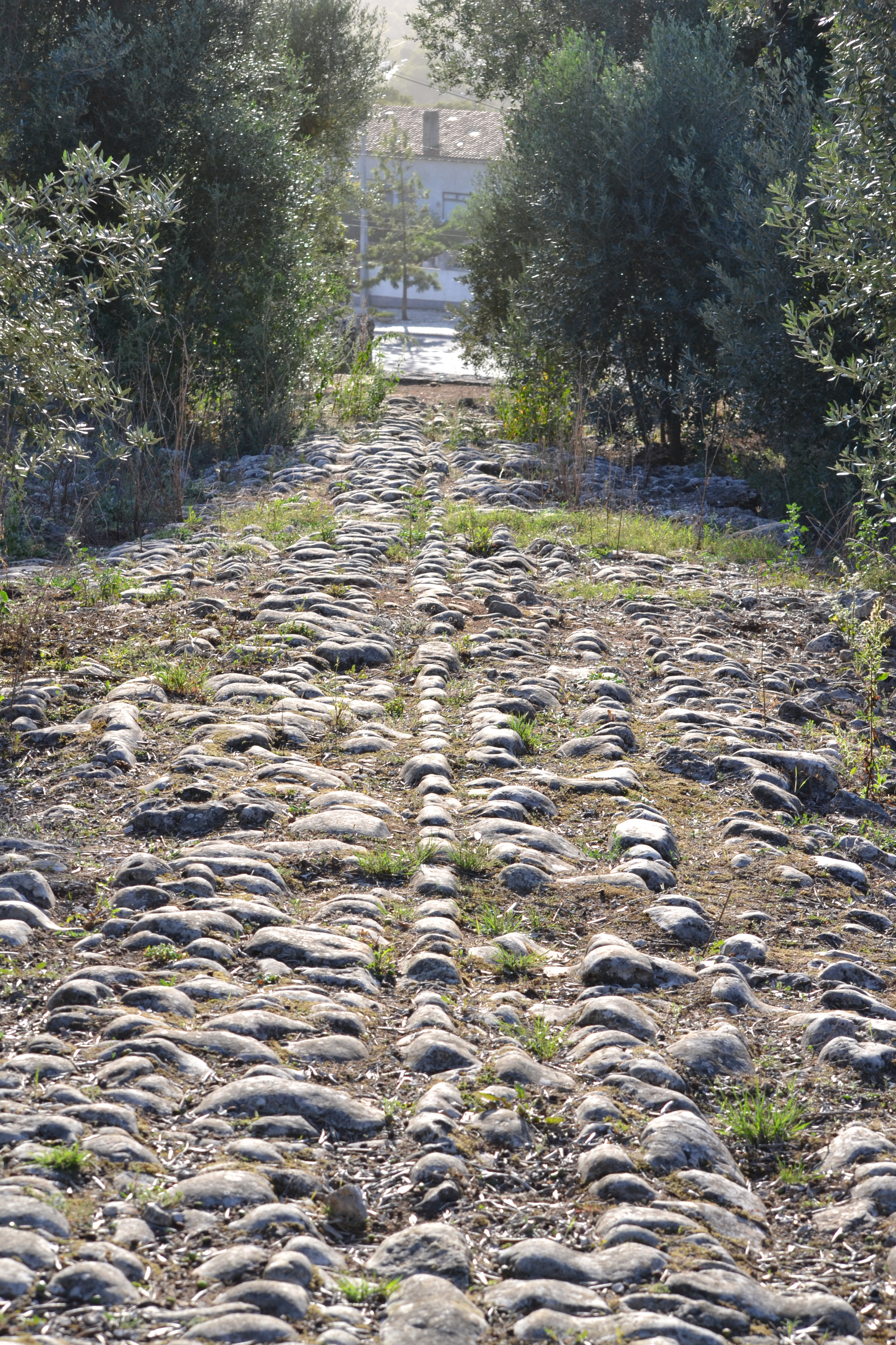 Troço de Via Romana em Alqueidão da Serra, vista da descida This file was uploaded for Wiki Loves Monuments in Portugal with the unique identifier 73614.